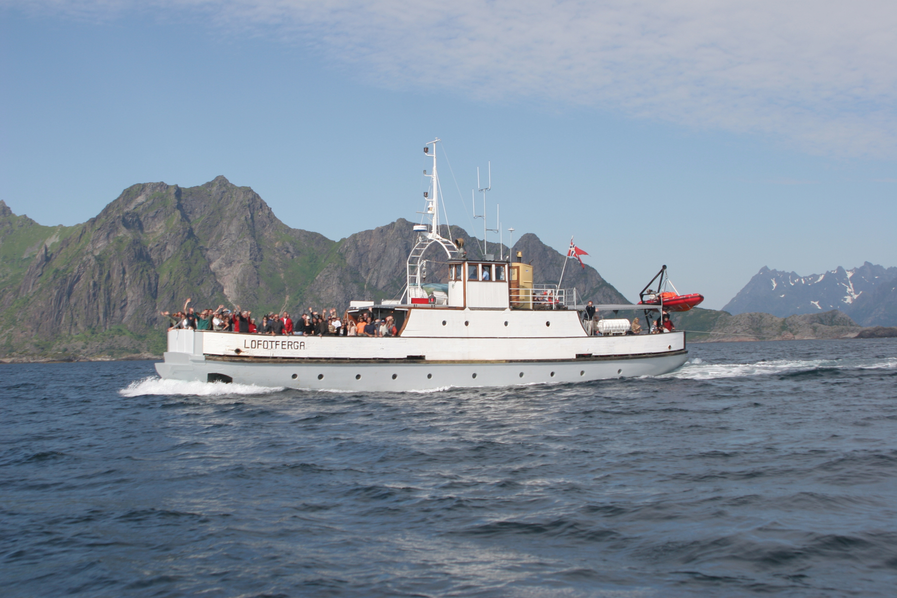 Gamle Lofotferga